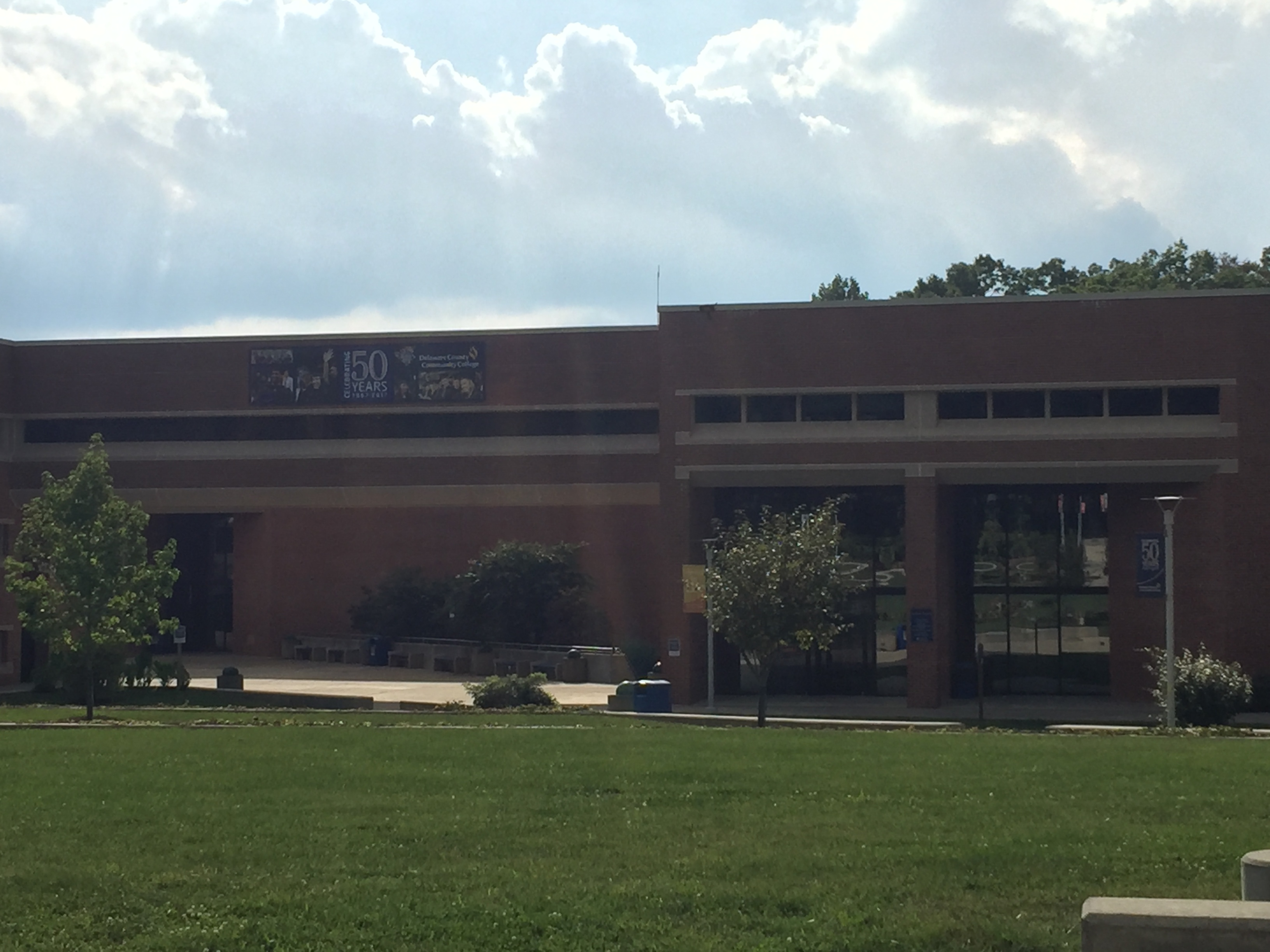 Main campus pic